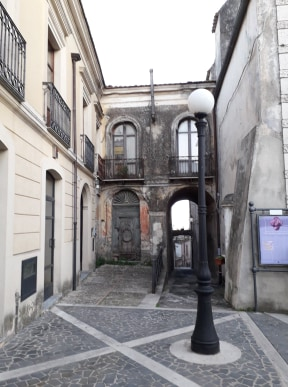 quartiere Grecìa CZ